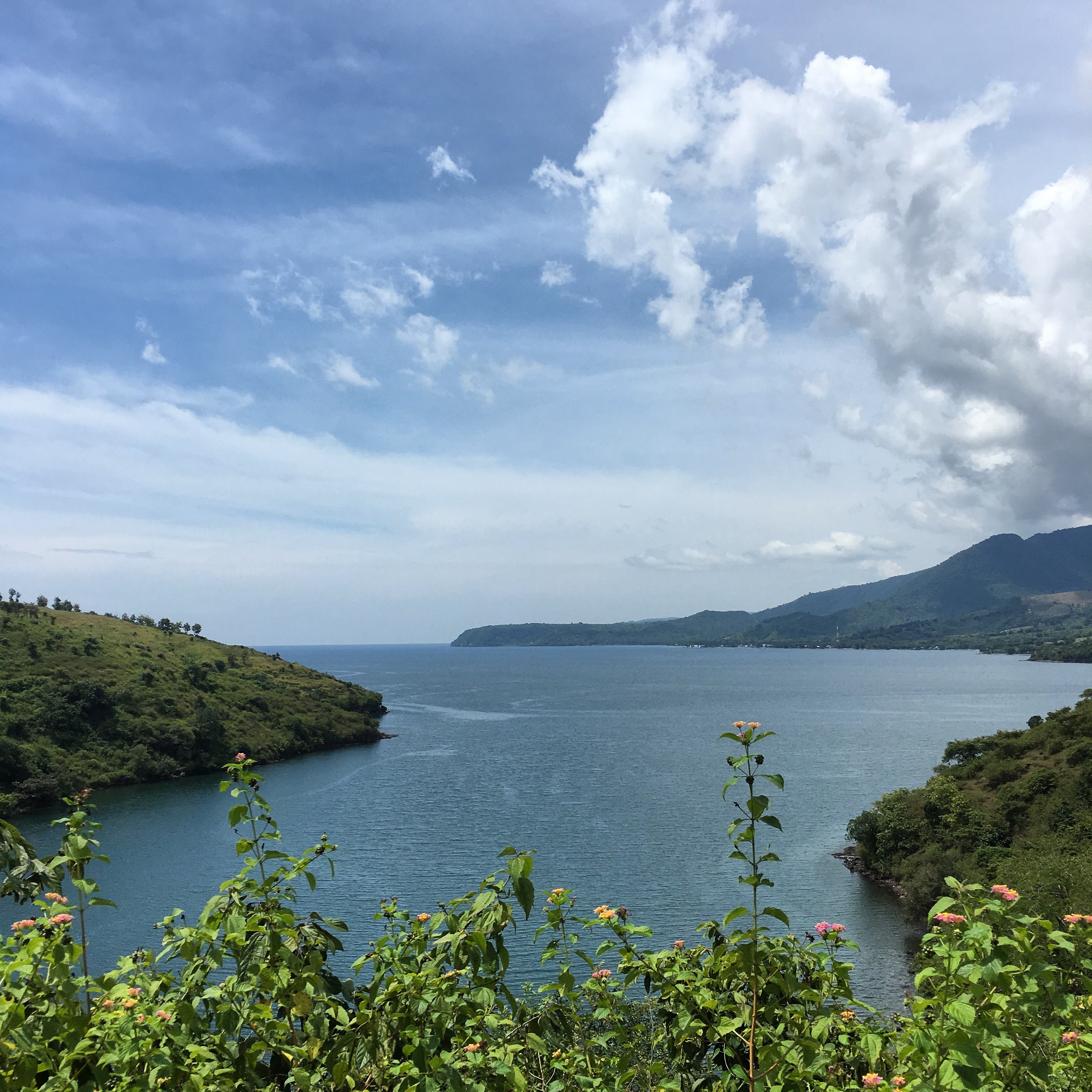 Asakota (Mulut Kota) adalah pintu masuk ke wilayah Bima melalui jalur air. Asakota terbagi menjadi dua sisi, sisi pertama berada di wilayah kecamatan Asakota (Kota Bima) dan sisi lainnya di kecamatan Soromandi (Kabupaten Bima) dimana foto ini diambil.